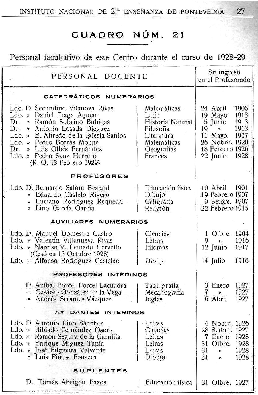 Instituto Nacional de 2.ª Enseñanza de Pontevedra. Personal facultuativo de este Centro durante el curso de 1928-29